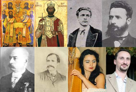 Известни българи: Св. Седмочисленици, Борис I, Васил Левски, Христо Ботев, Христо Стамболски, Георги Раковски, Анна-Мария Равнополска-Дийн, Веселин Топалов